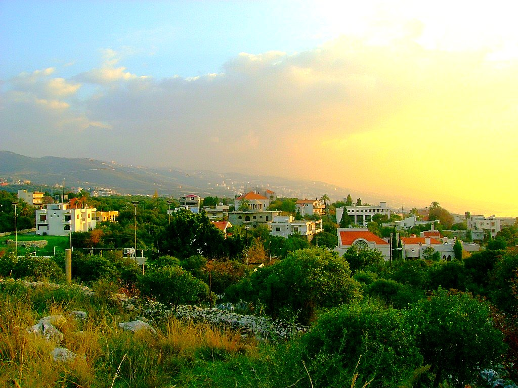 Edde Village